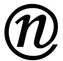 Nコードであることを表示するNマーク